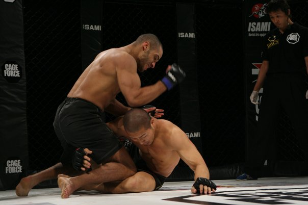 comat entre paraisy et ozaki